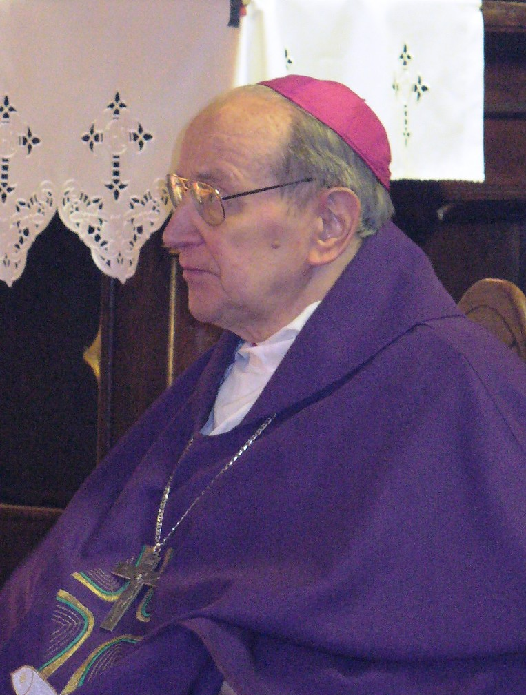 Zdjęcie biskupa seniora włocławskiego Czesława Lewandowskiego (2007).